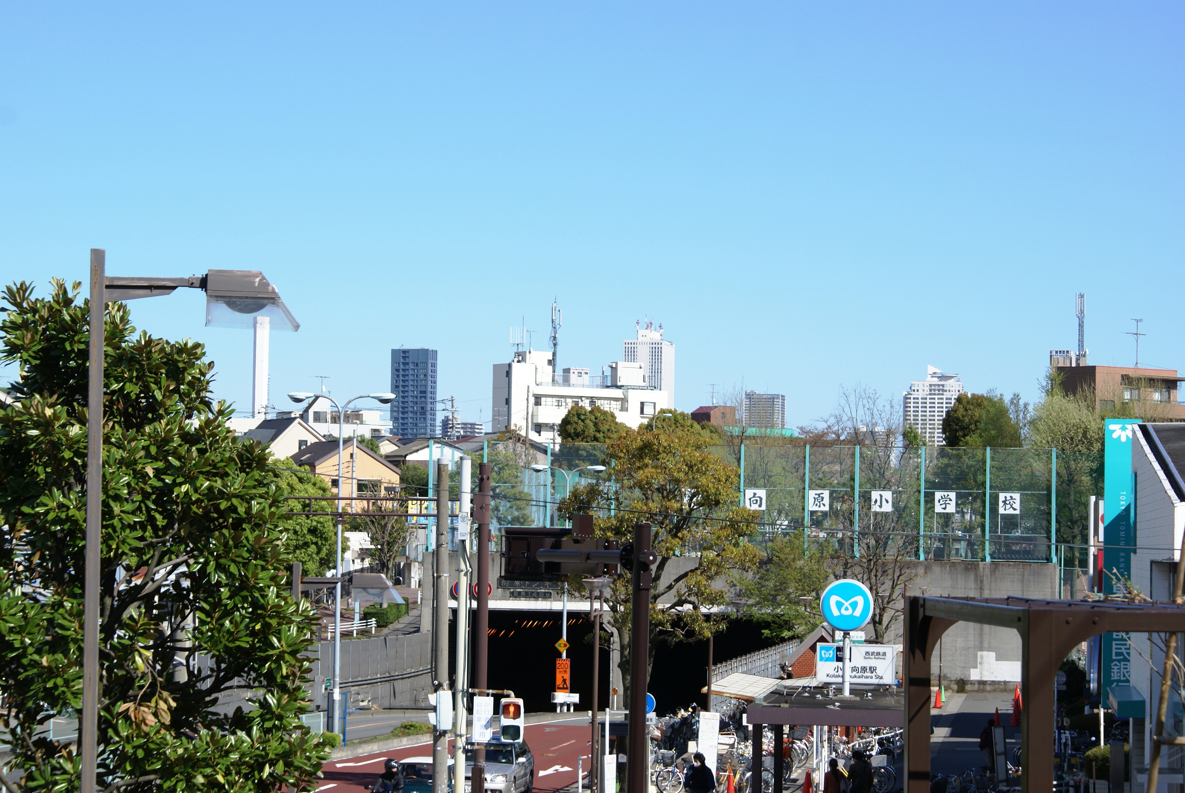 小竹向原駅と向原小学校